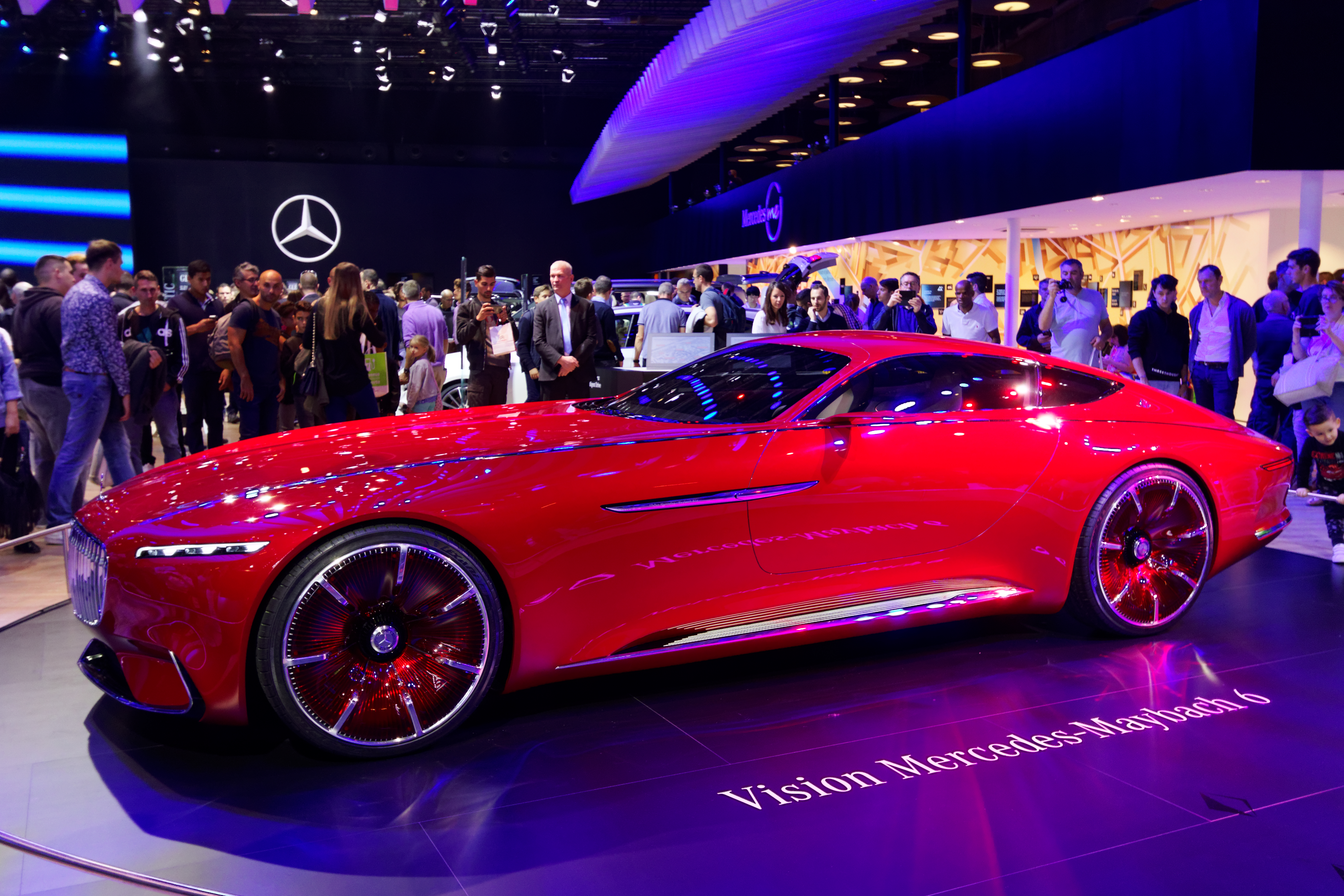 Une Vision Mercedes-Maybach 6 présentée lors du mondial de l'automobile de Paris 2016.